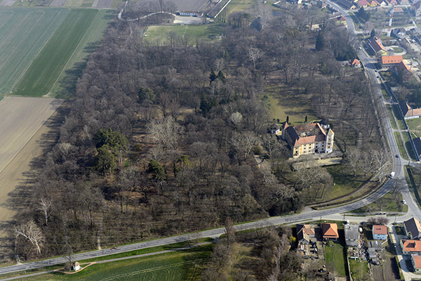 A Hédervári kastély látképe madártávlatból